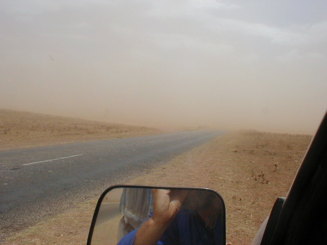 Walon: Timpesse avou do såvlon e l' air (Sidi Smayil, Marok)